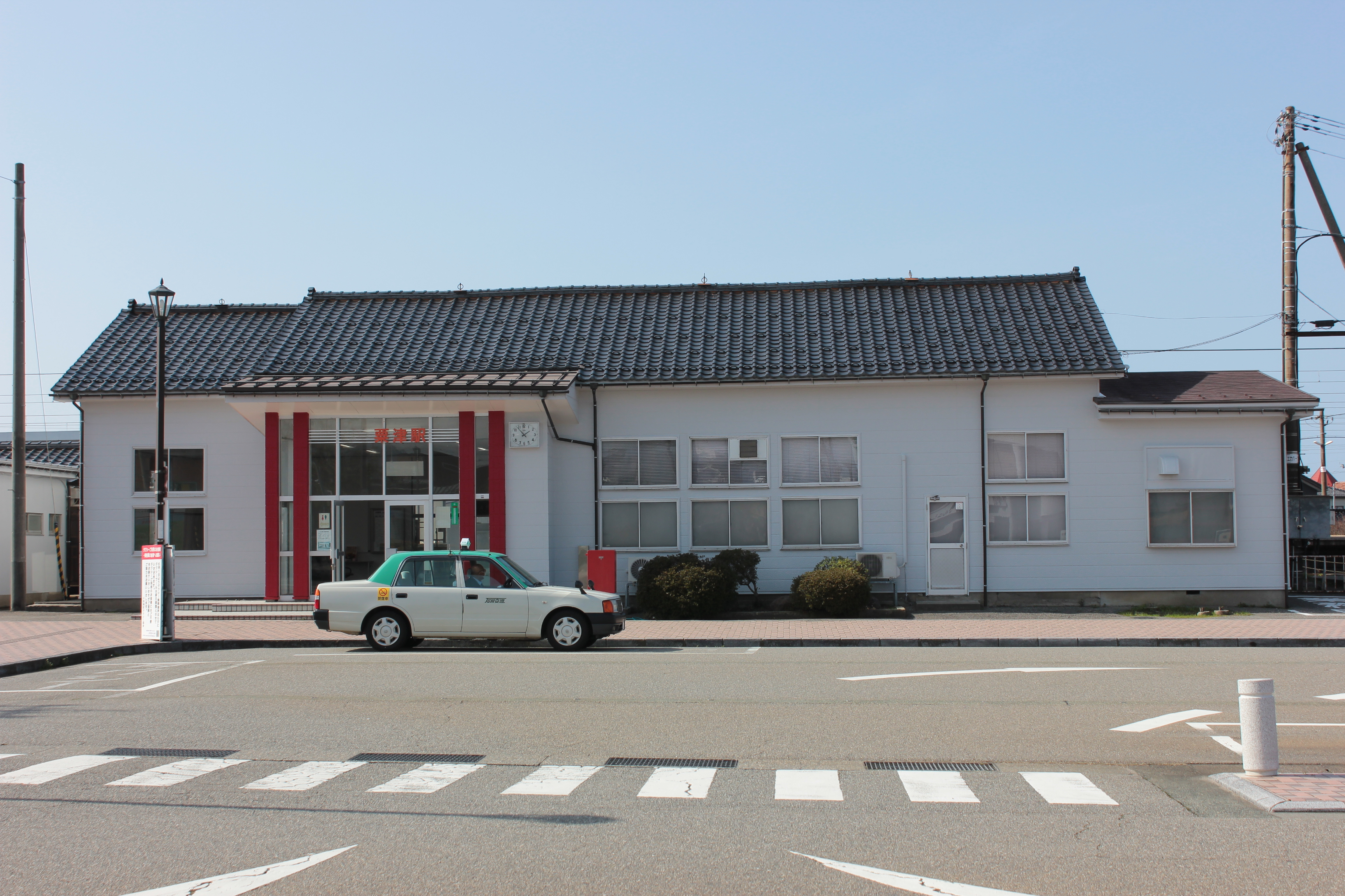 粟津駅（石川県小松市） Canon EOS Kiss X5